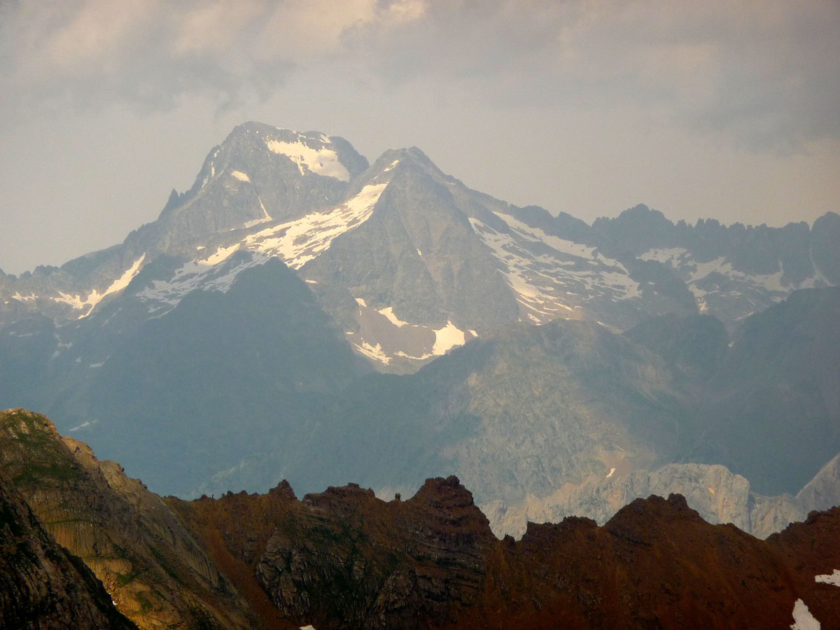 Macizo de Balaitús. Picos de Balaitús y Frondiellas